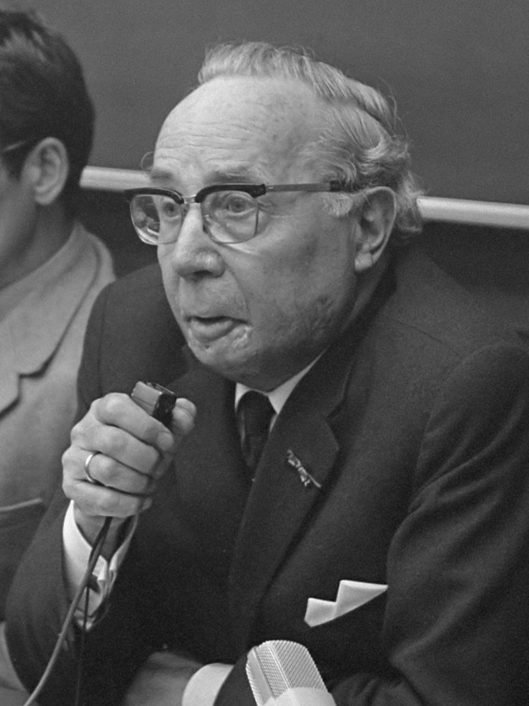 Studenten van de Vrije Universiteit te Amsterdam vergaderen over de bezetting en ontzetting van het Provisorium. Prof. G.J. Sizoo (rector magnificus) heeft de microfoon 20 juni 1969